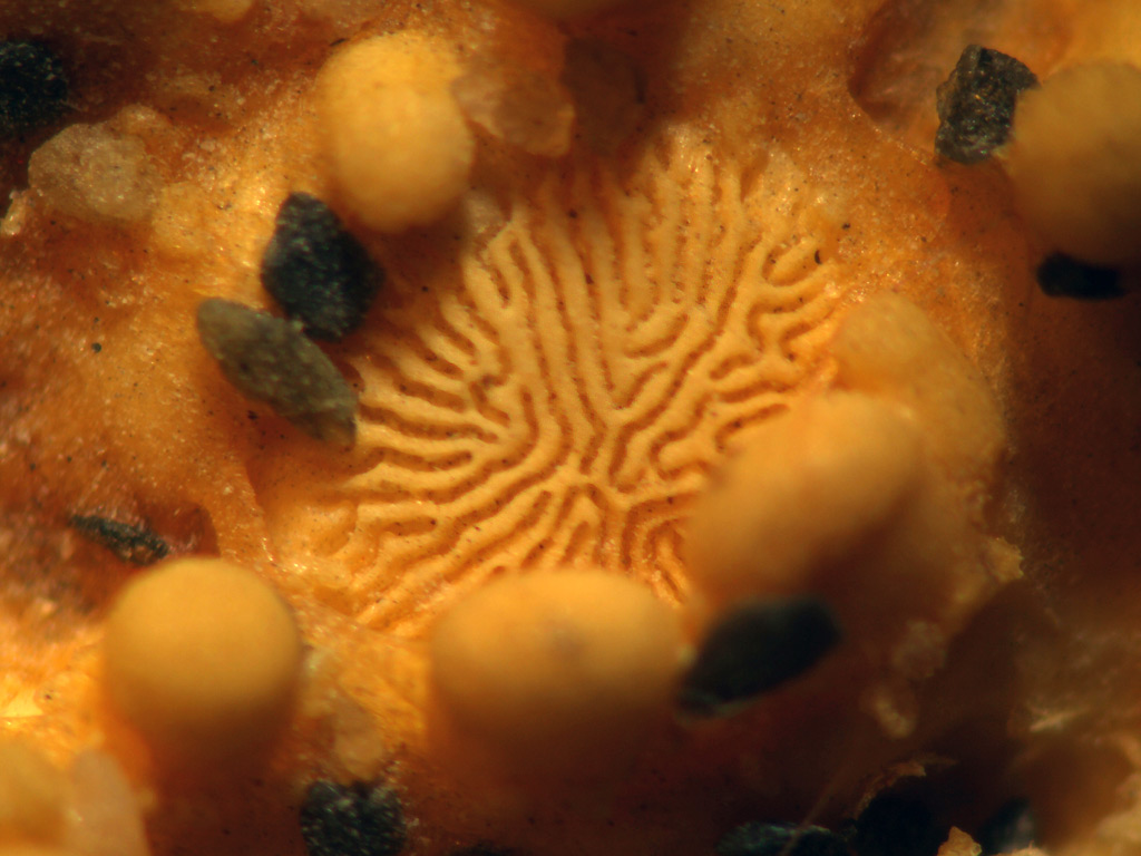 Placa madrepórica; probablemente Asterias sp.